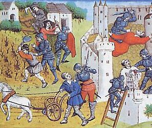 Grandes compagnies attaquant des paysans et des moines